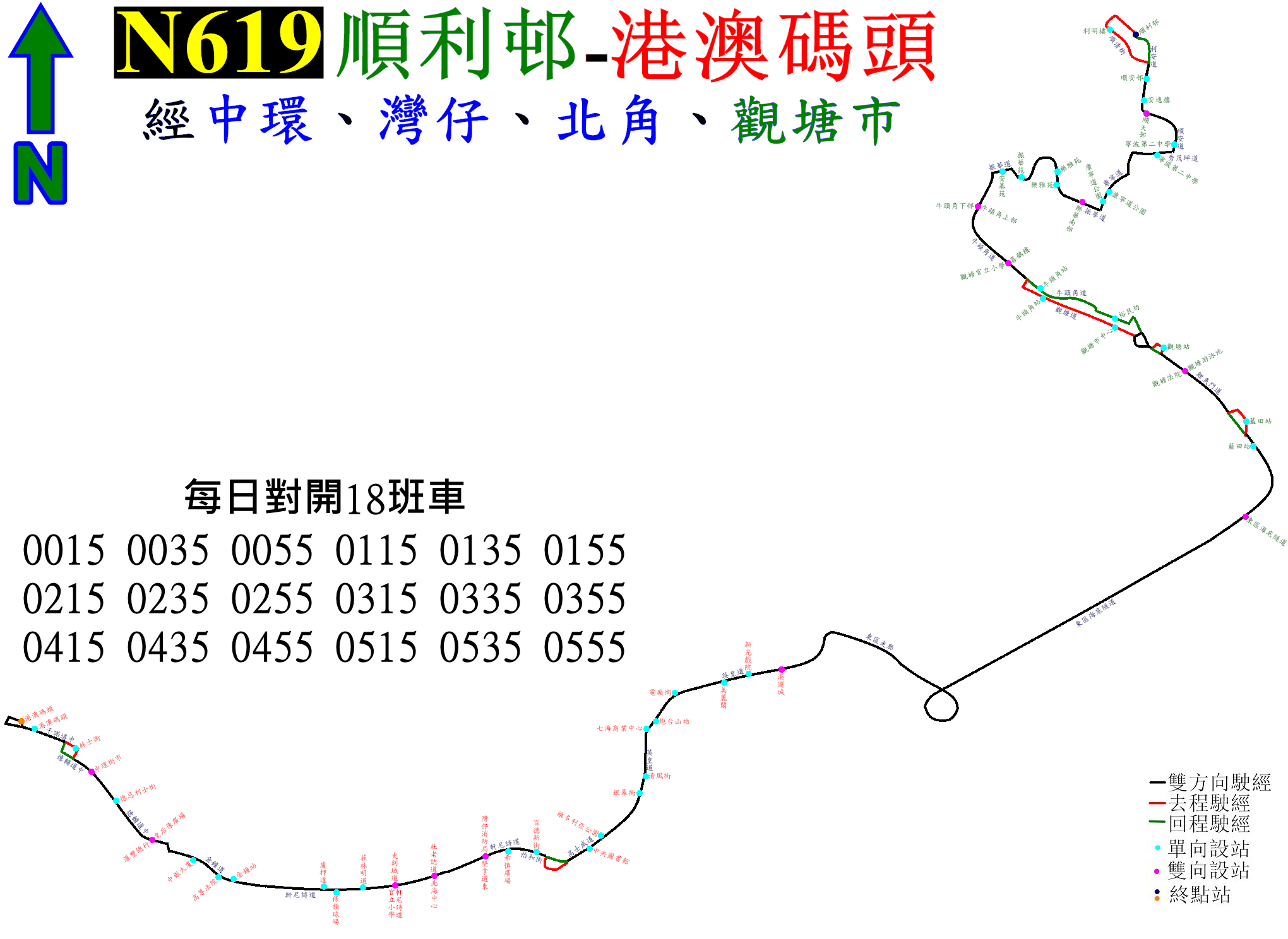 中文（香港）: 過海隧巴N619線的走線圖